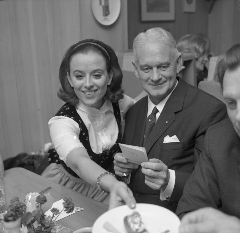 Empfang in der Landesvertretung Bayern